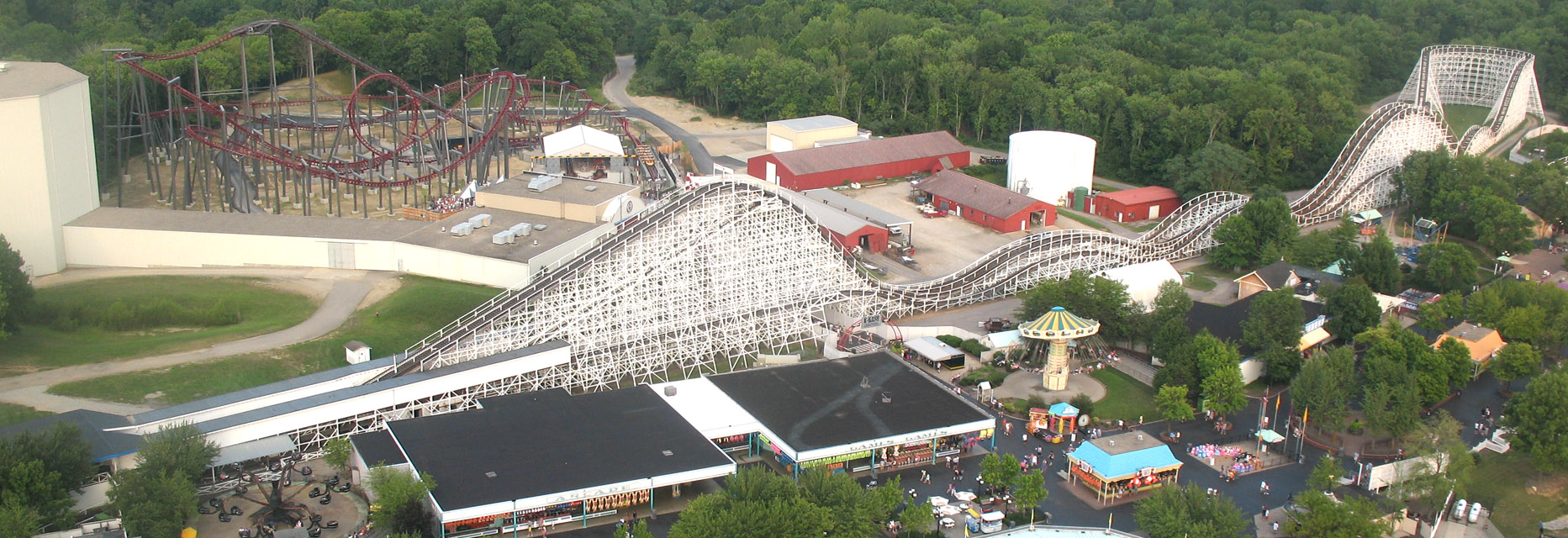 Racer , montagnes russes à Kings Island